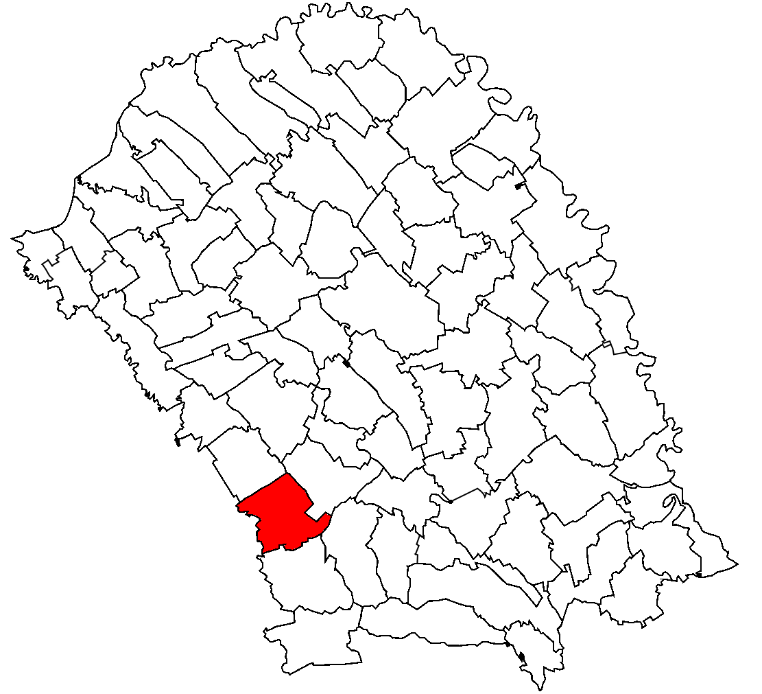 Categorie:Hărţi ale judeţului Botoşani